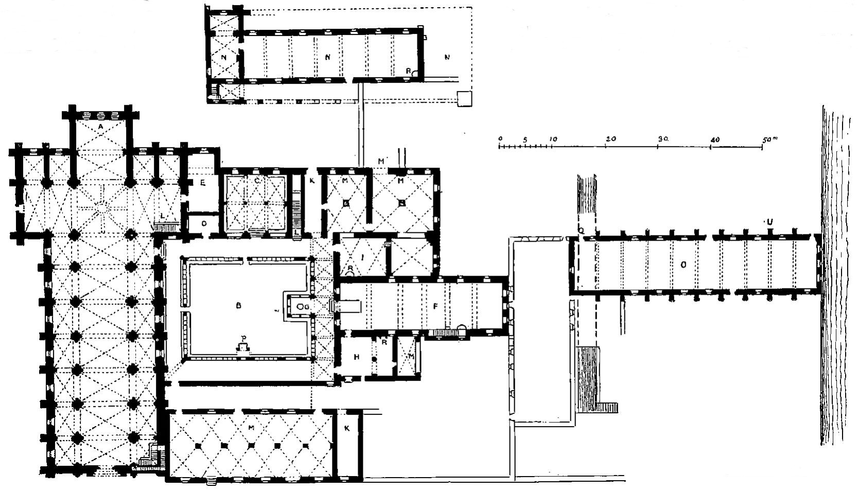 C. Enlart - Image illustrant le "Plan de l’abbaye de Fossanova" (dans: « L'abbaye de Fontenay et l'architecture cistercienne »). A, l’église, avec ses chapelles et son chœur sur plan carré, la croisée surmontée d’une coupole et d’un clocher ; B, le cloître, entouré des bâtiments réguliers ; C, la salle capitulaire ; H, la salle réservée aux travaux intérieurs, qui occupe l’extrémité du bâtiment oriental surmonté du dortoir ; I, le chauffoir ; F, le réfectoire et sa chaire du lecteur ; G, le lavabo, sous un charmant édicule, d’après un cliché très obligeamment communiqué par notre ami M. C. Enlart : cette construction, surmontée d’une pyramide, abritait une vasque circulaire aujourd’hui mutilée, après avoir été transformée en une sorte de guéridon ; M, le cellier aux provisions ; N, l’hôtellerie pour les ecclésiastiques, O, l’infirmerie, soigneusement isolée, placée, comme toujours, à proximité du cours d’eau.